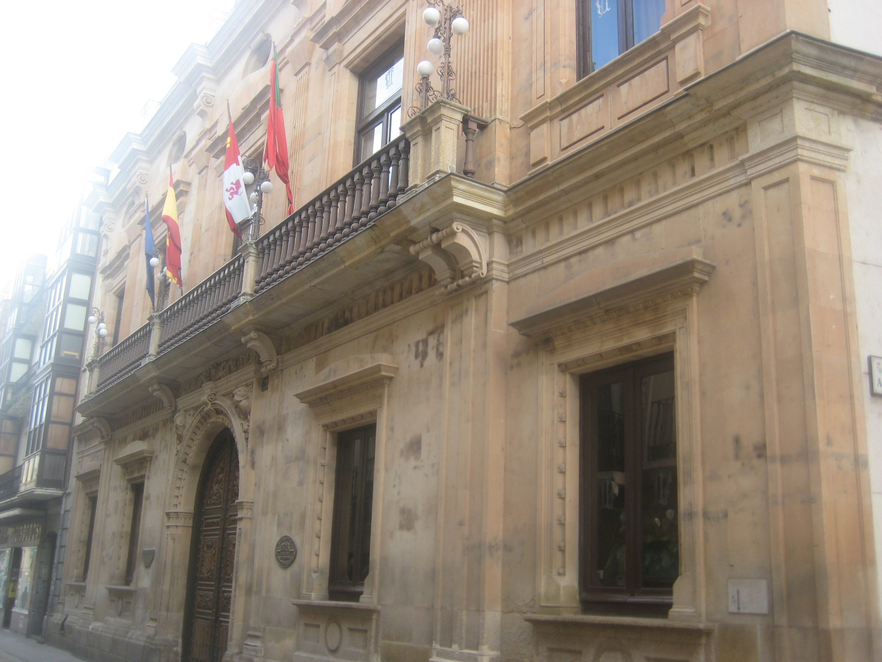 Antigua Diputación de Zamora.